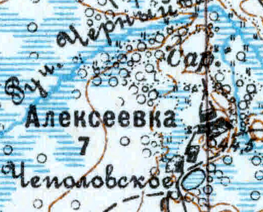 Топографическая карта Ленинградской области, квадрат VIc-28 (Луга), деревня Алексеевка